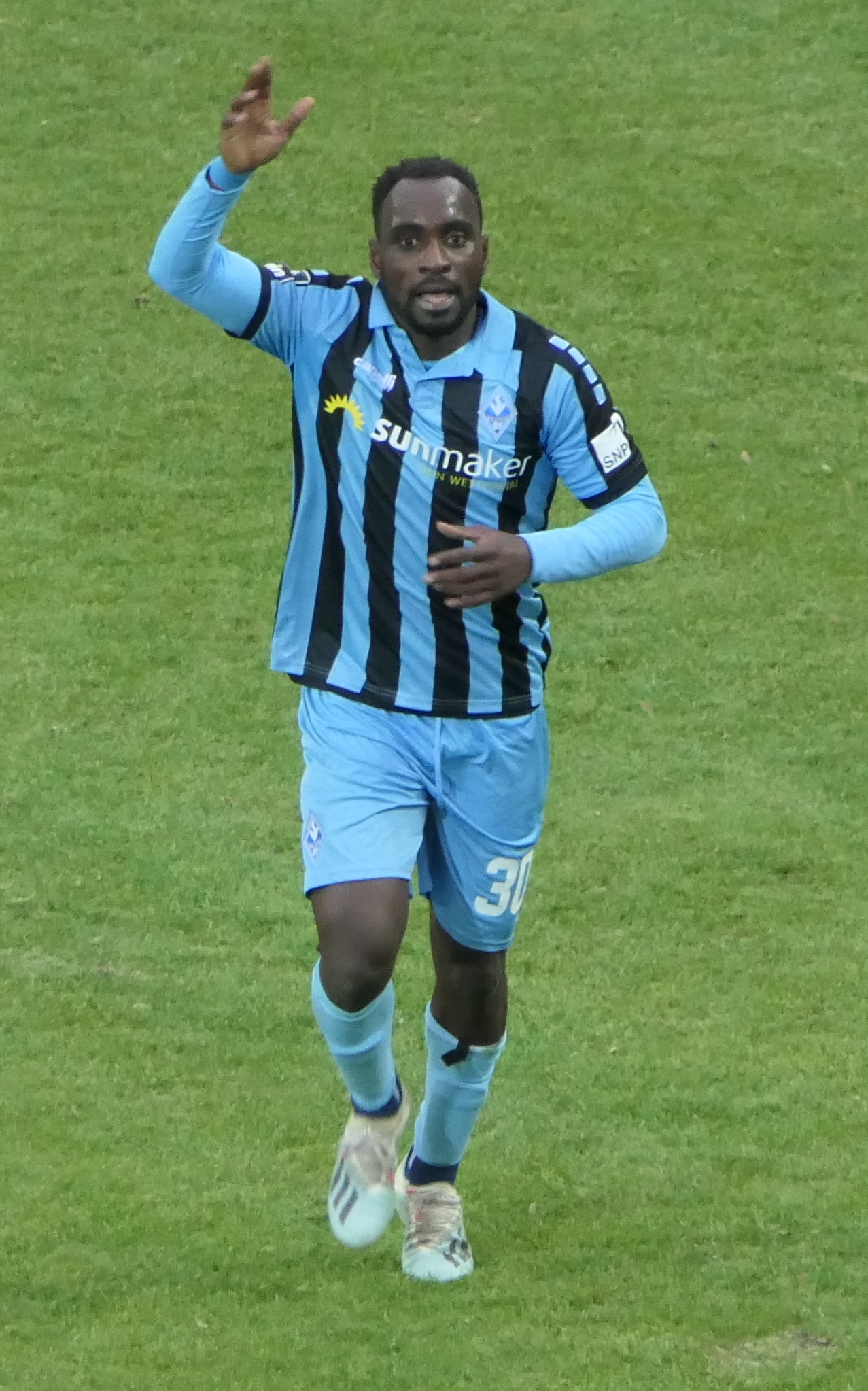 Der Fussballprofi Kevin Koffi im Trikot vom SV Waldhof Mannheim beim Heimspiel gegen Eintracht Braunschweig am 08.12.2019.